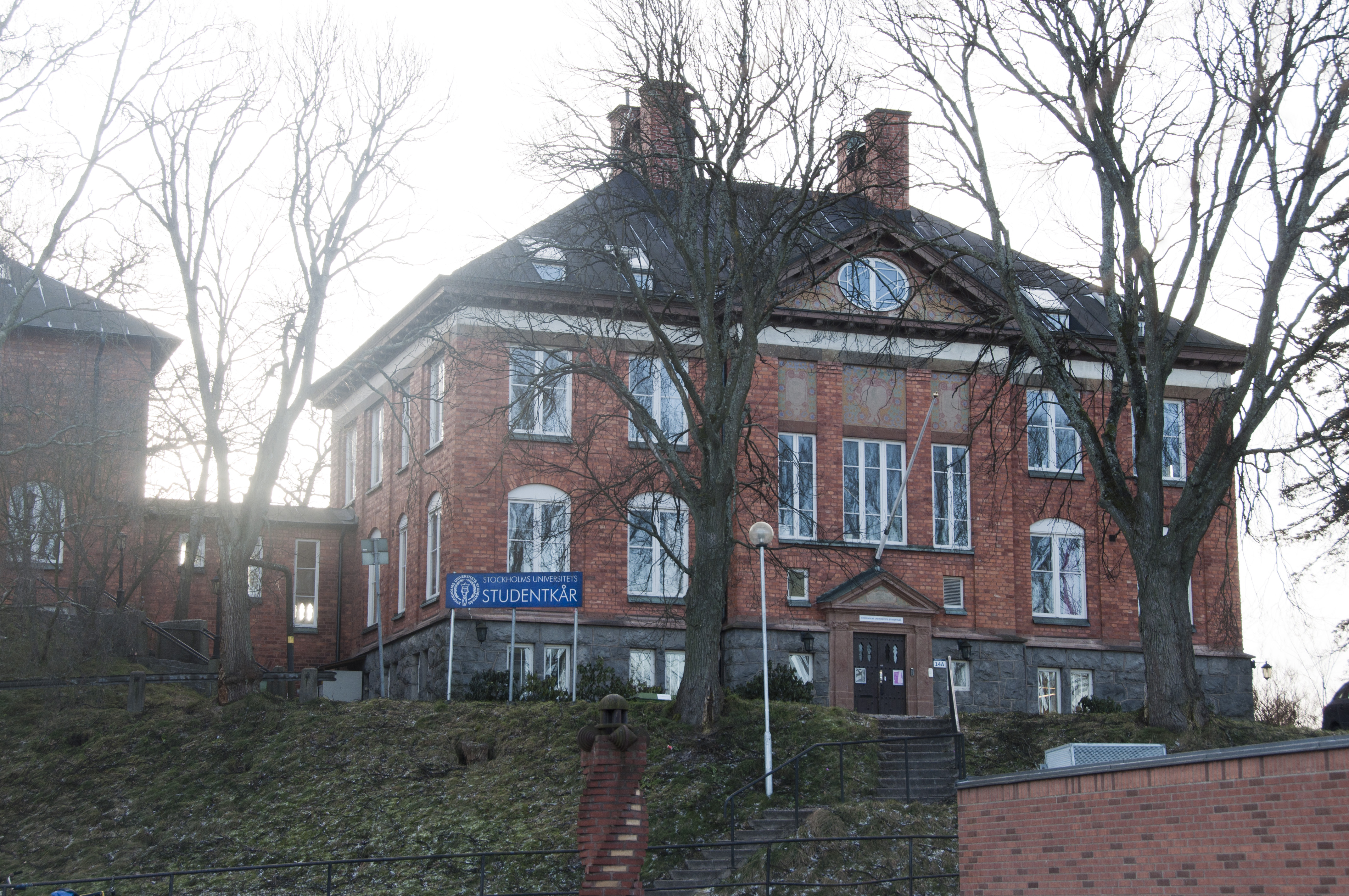 Nobelhusen, tidigare Nobelinstitutet för fysikalisk kemi, byggnadsår 1909 som bostad och laboratorium till Nobelpristagaren Svante Arrhenius. Arkitekt Rudolf Enblom. Idag Stockholms Studentkår.